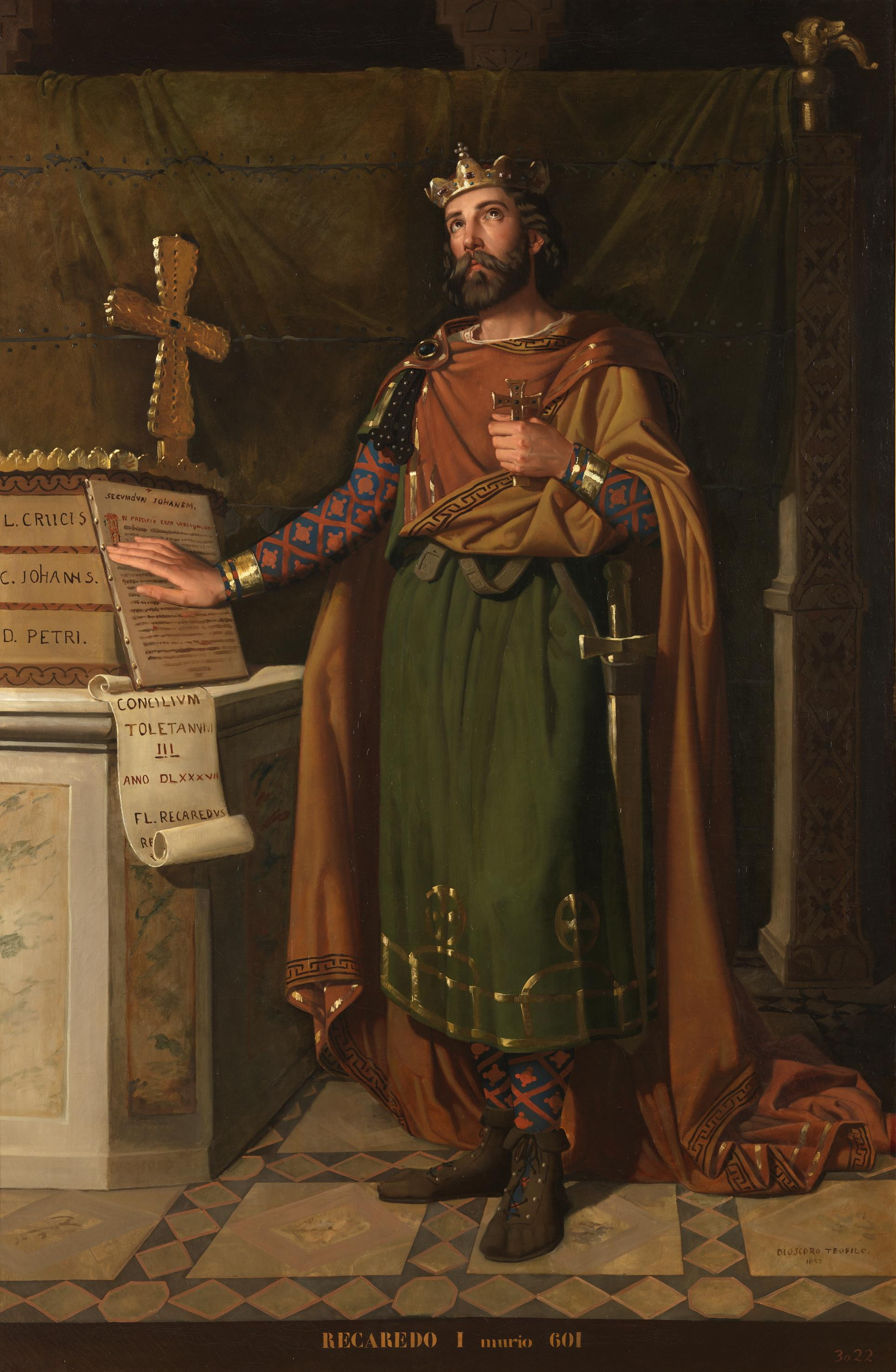 Retrato imaginario de Recaredo I († 601), rey de los Visigodos e hijo del rey Leovigildo y de su primera esposa, cuyo nombre se desconoce.